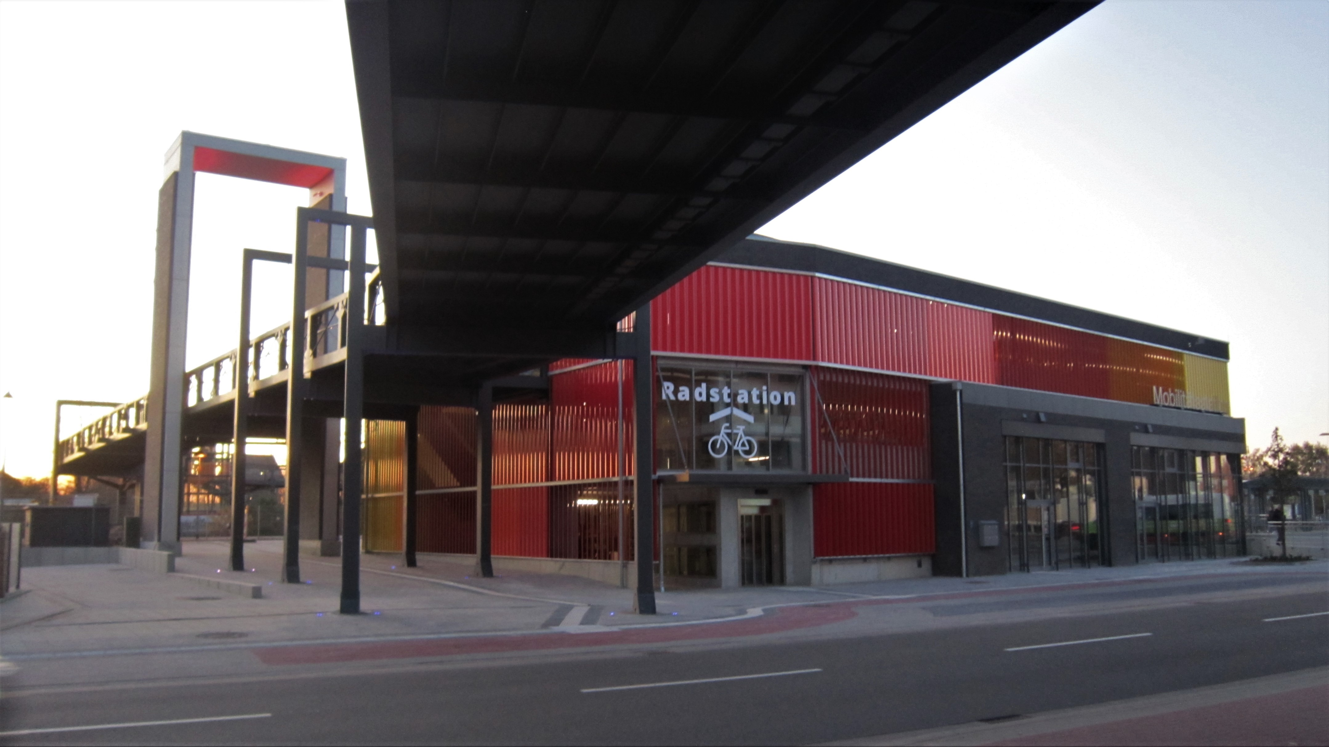 Eingang zur Radstation (Fahrradabstellhaus) beim Bahnhof Vechta. Daneben die Bahnhofsbrücke